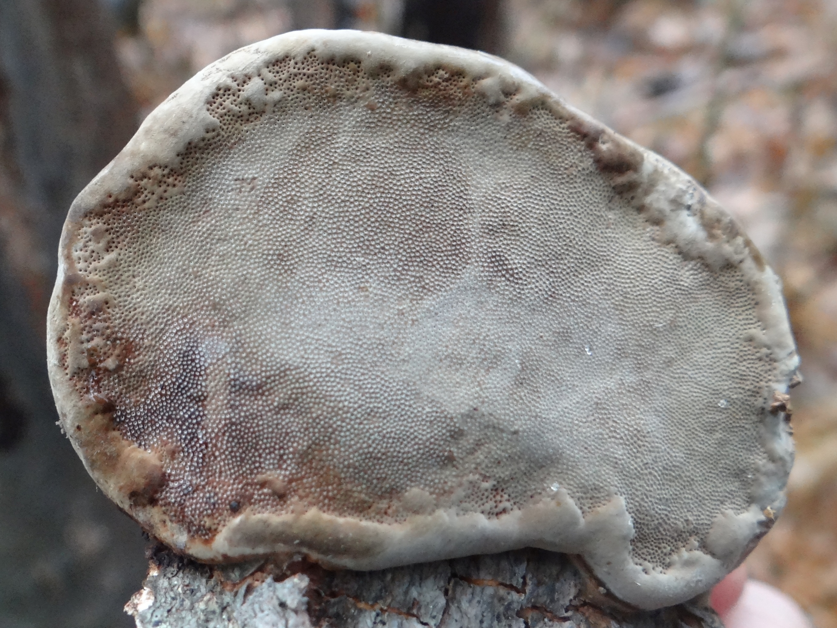 Perenniporia fraxinea on Fraxinus excelsior (location: Poland, Kamionna, województwo małopolskie)